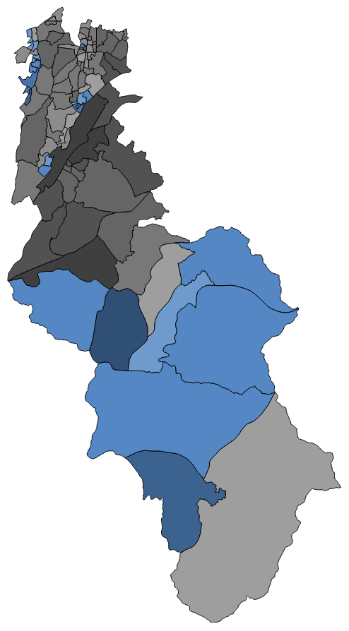 顏色對照表